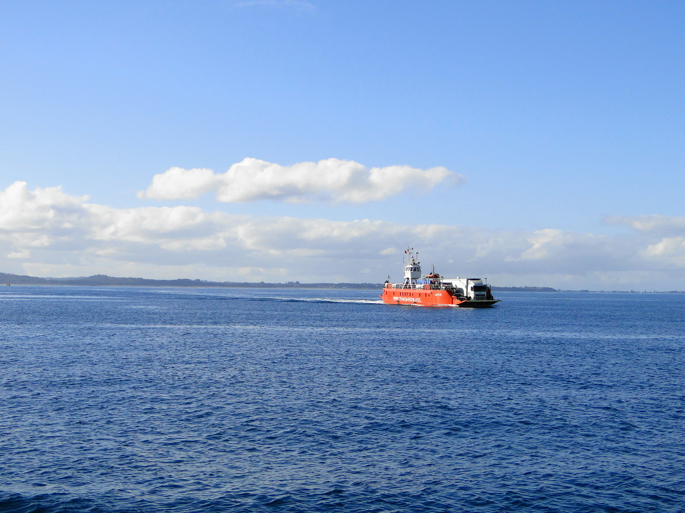 Cruzando el canal de Chacao